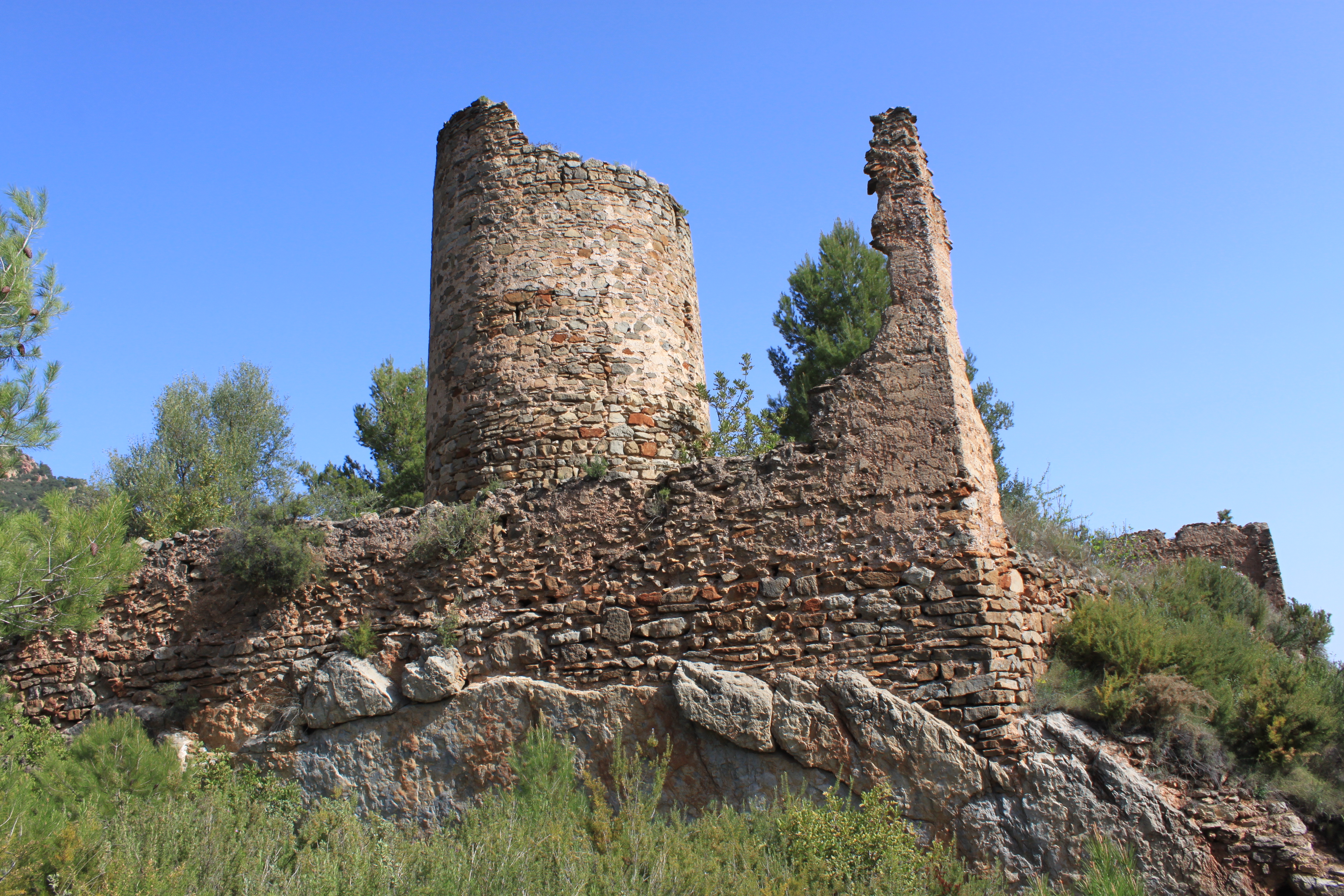 Vista del Castillo de Aín, provincia de Castellón en la Comunidad Valenciana, España.